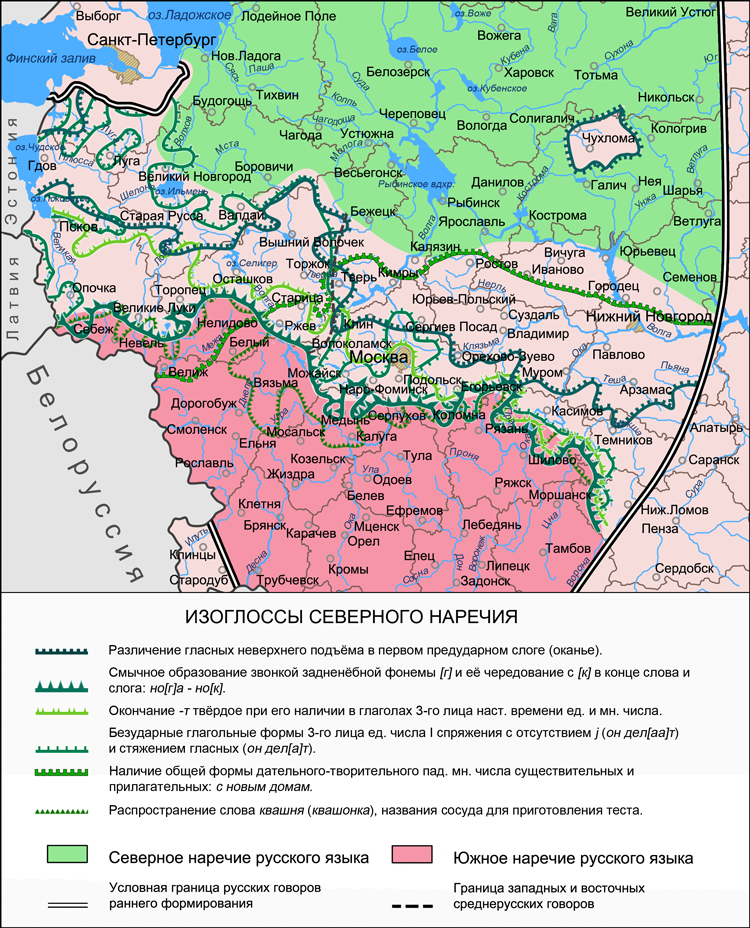 Карта изоглосс северного наречия на территории среднерусских говоров. На основе данных: Захарова К. Ф., Орлова В. Г. Диалектное членение русского языка. М.: Наука, 1970. 2-е изд.: М.: Едиториал УРСС, 2004 Язык русской деревни